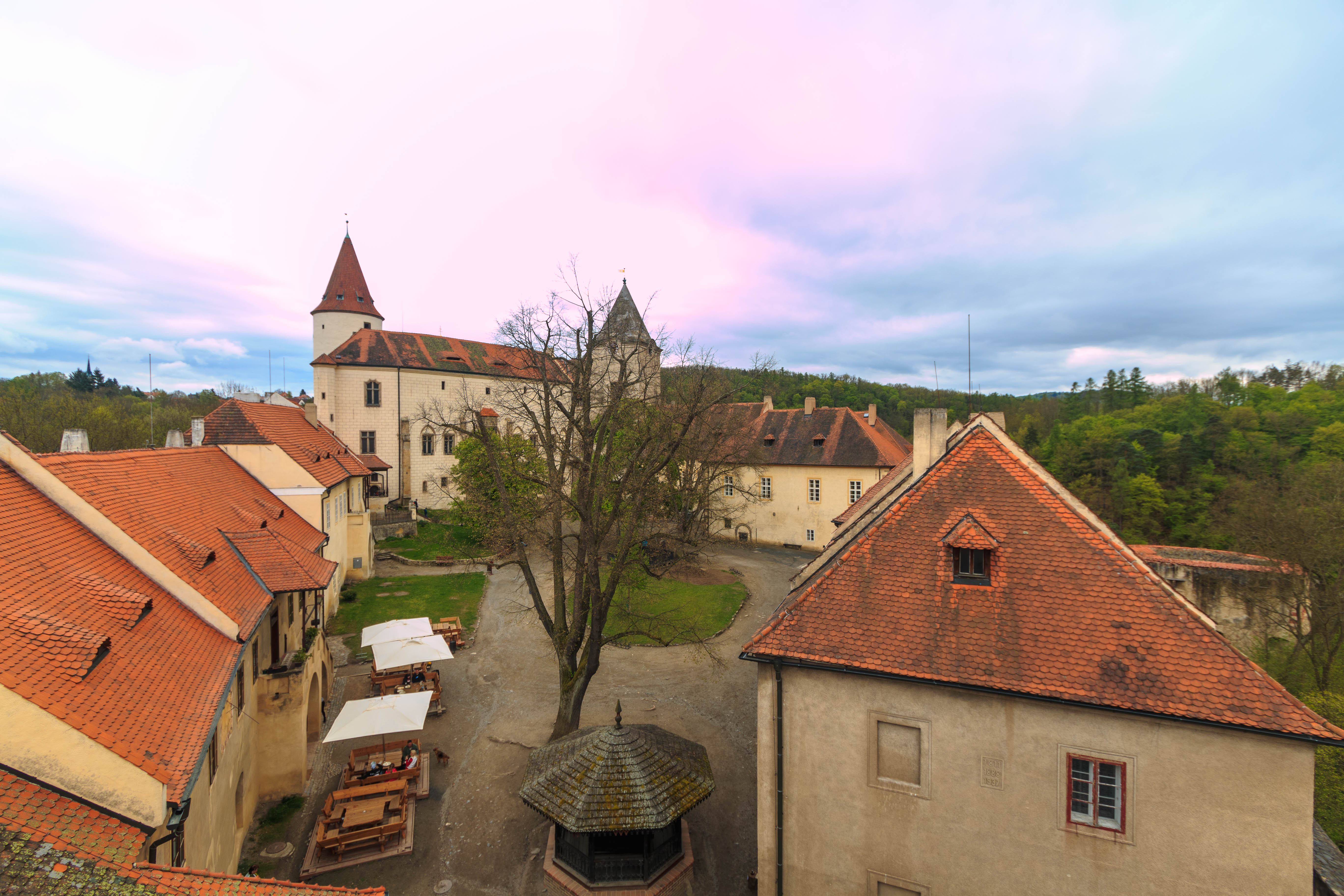 Hrad Křivoklát, Křivoklát 47, 48, 114, 132, 133, 134, 135, 136, 137, Křivoklát (městys).